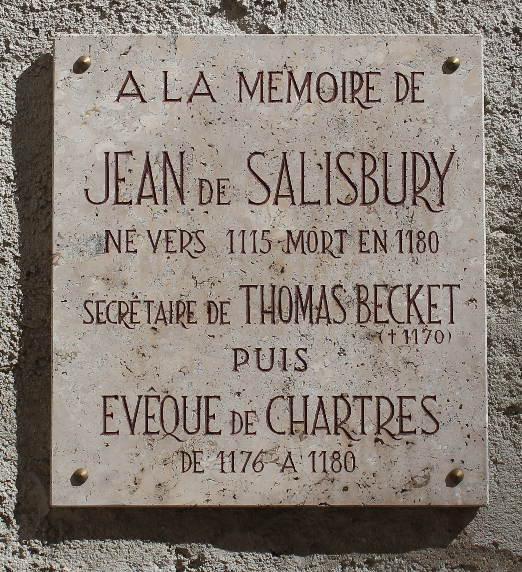 Plaque apposée à Chartres : "A la mémoire de Jean de Salisbury né vers 1115 mort en 1180 secrétaire de Thomas Becket (mort en 1170) puis évêque de Chartres de 1176 à 1180."